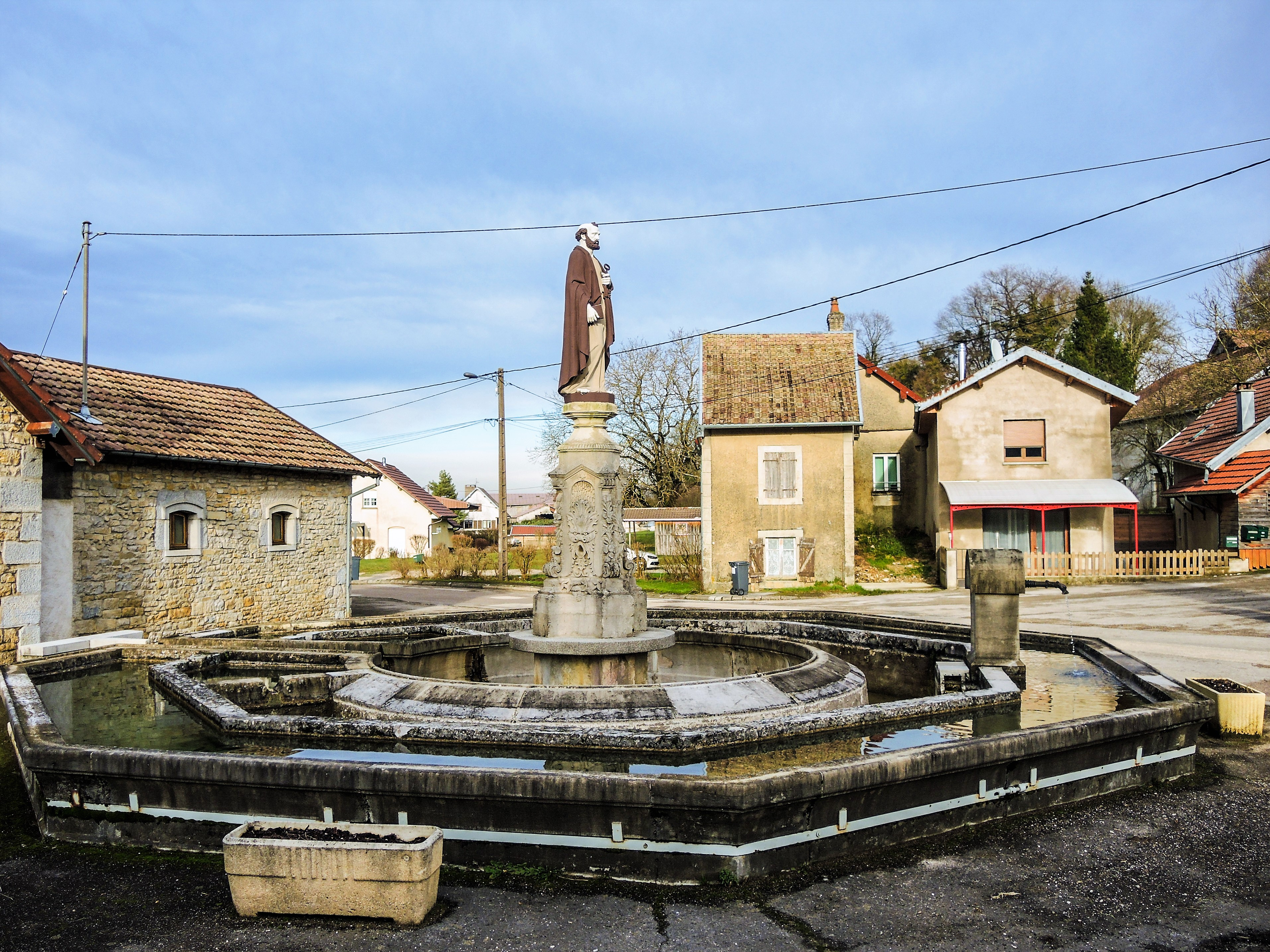 Fontaine-lavoir-abreuvoir octogonale Saint Pierre. Lanans. Doubs